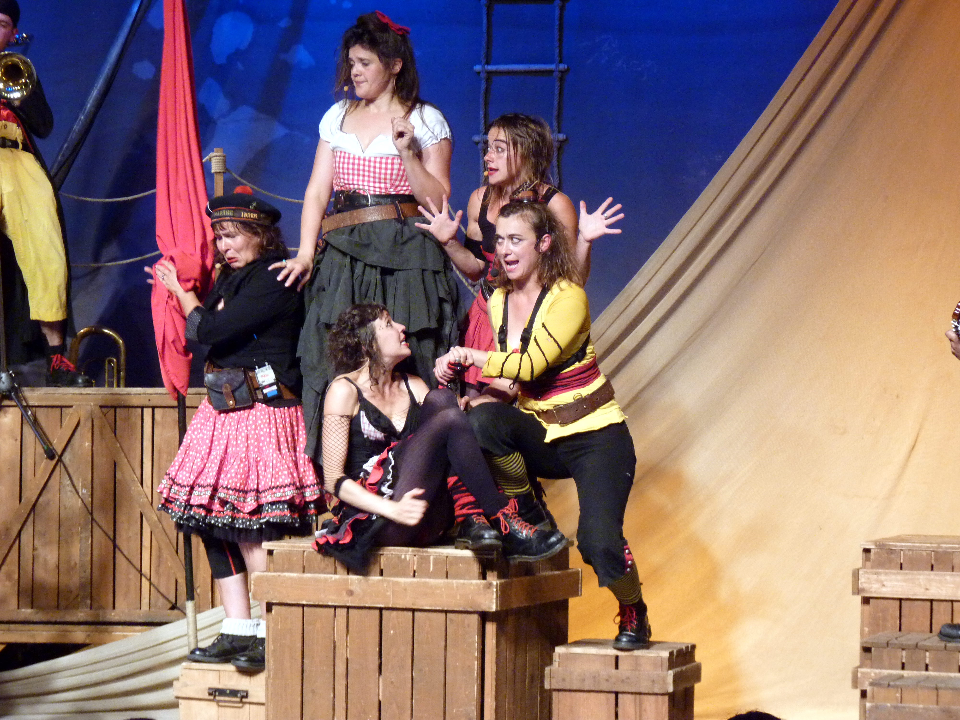 La Compagnie Jolie Môme en spectacle à Saint Amant Roche Savine le 31 juillet 2011.